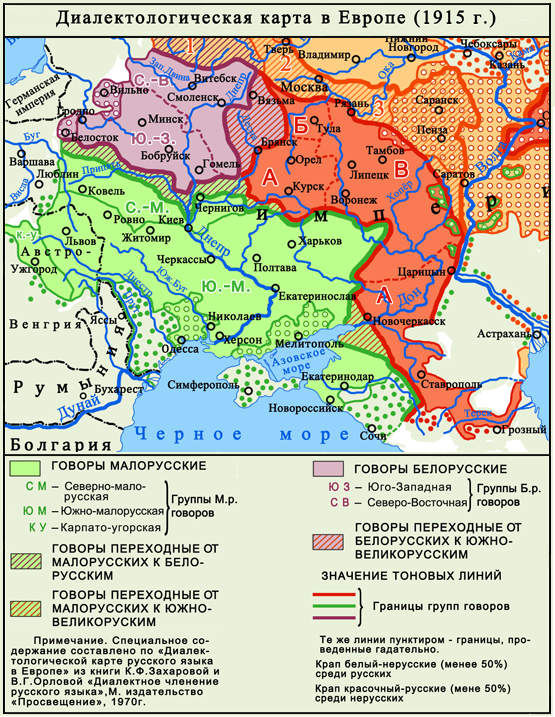 Мовна ситуація станом на 1915 рік у Східній Європі. На основі данних: К. Ф. Захарова, В. Г. Орлова. Диалектное членение русского языка. М.: Наука, 1970. 2-е изд.: М.: Едиториал УРСС, 2004 Русские. Монография Института этнологии и антропологии Н.Н. Дурново, Н. Н. Соколов, Д. Н. Ушаков. Опыт диалектологической карты русского языка в Европе, М., 1915